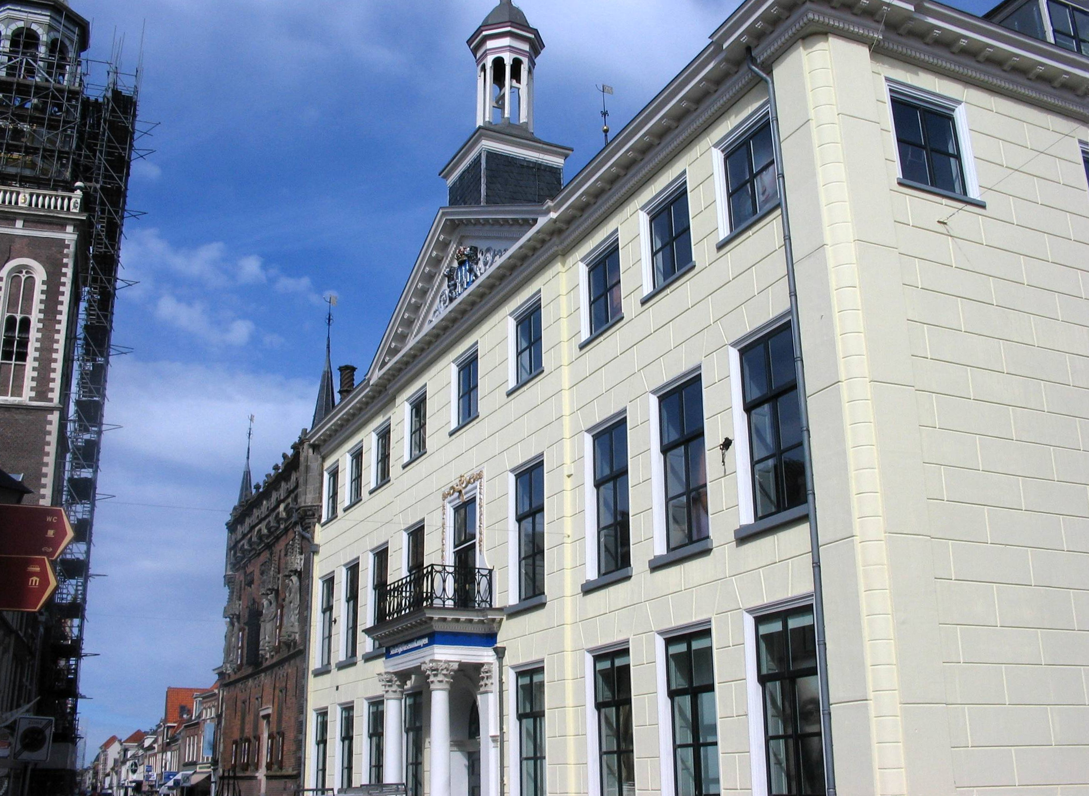 Kampen - Nieuwe raadhuis. Klassicistisch gebouw (1830-1835)